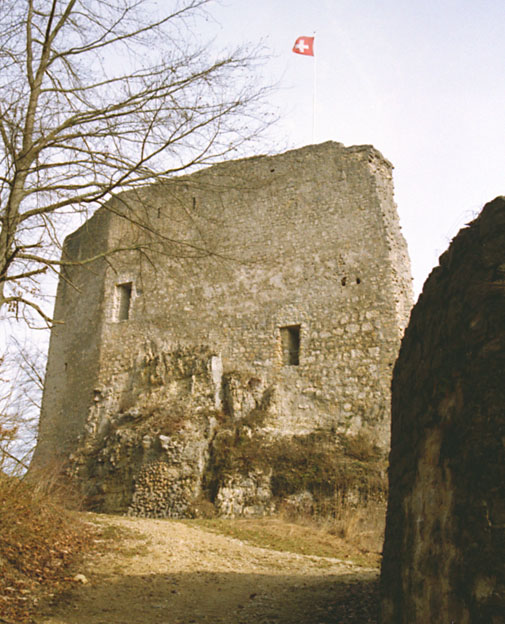 Uebersicht Schildmauer (von Sued) und Vorwerk der Farnsburg, Basel-Landschaft, Schweiz